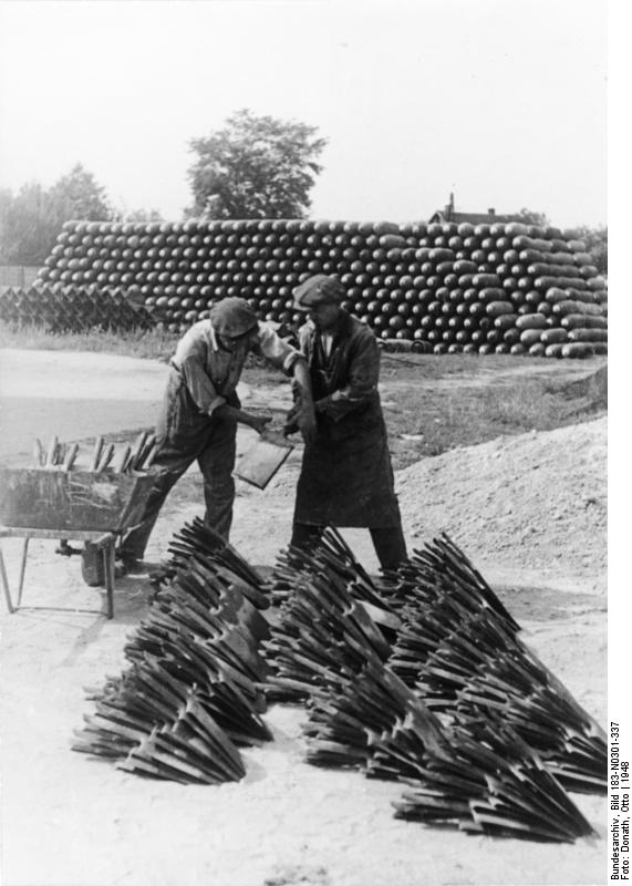 ADN-ZB/Donath In einem Betrieb in Mehderitzsch bei Torgau, der Massenbedarfgüter produziert, werden aus dem Stahlblech von Bombenhülsen Eimer, Kochtöpfe, Spaten und Schaufeln hergestellt. Aufn. 1948